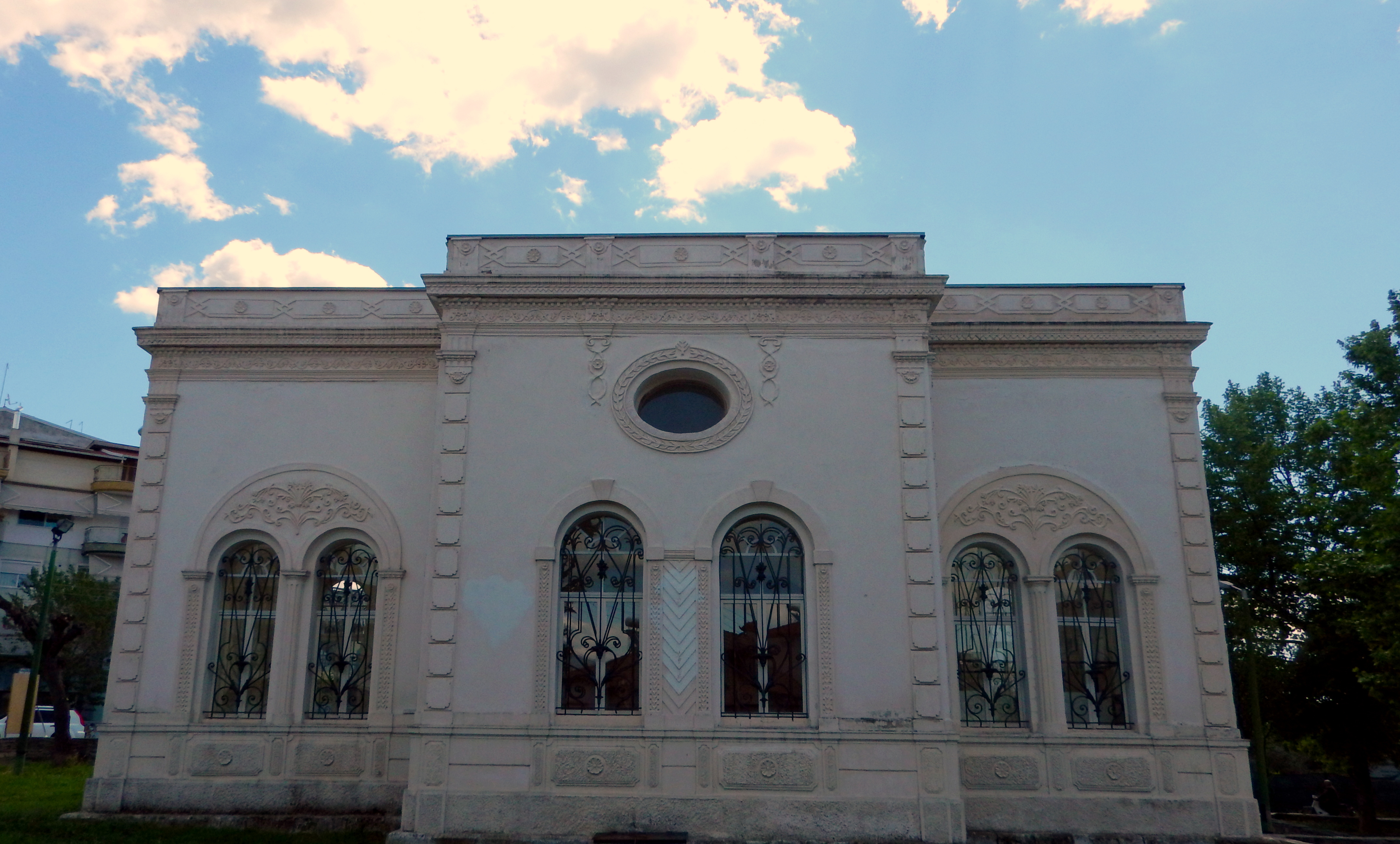 Μαυσωλείο του Γαζή Εβρενός«Μαυσωλείο του Γαζή Εβρενός»